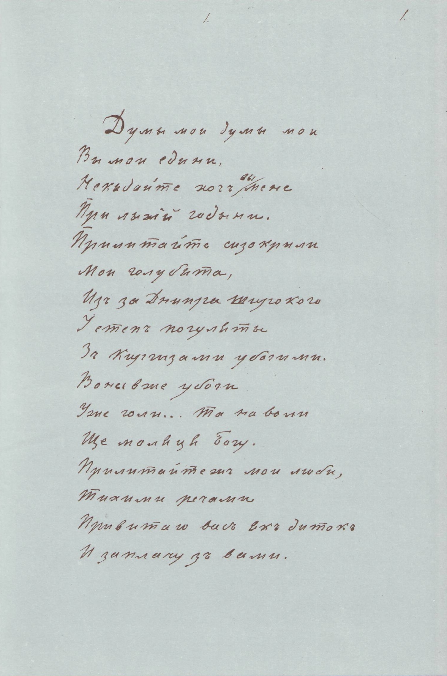 Автограф поезії Шевченка "Думи мої"